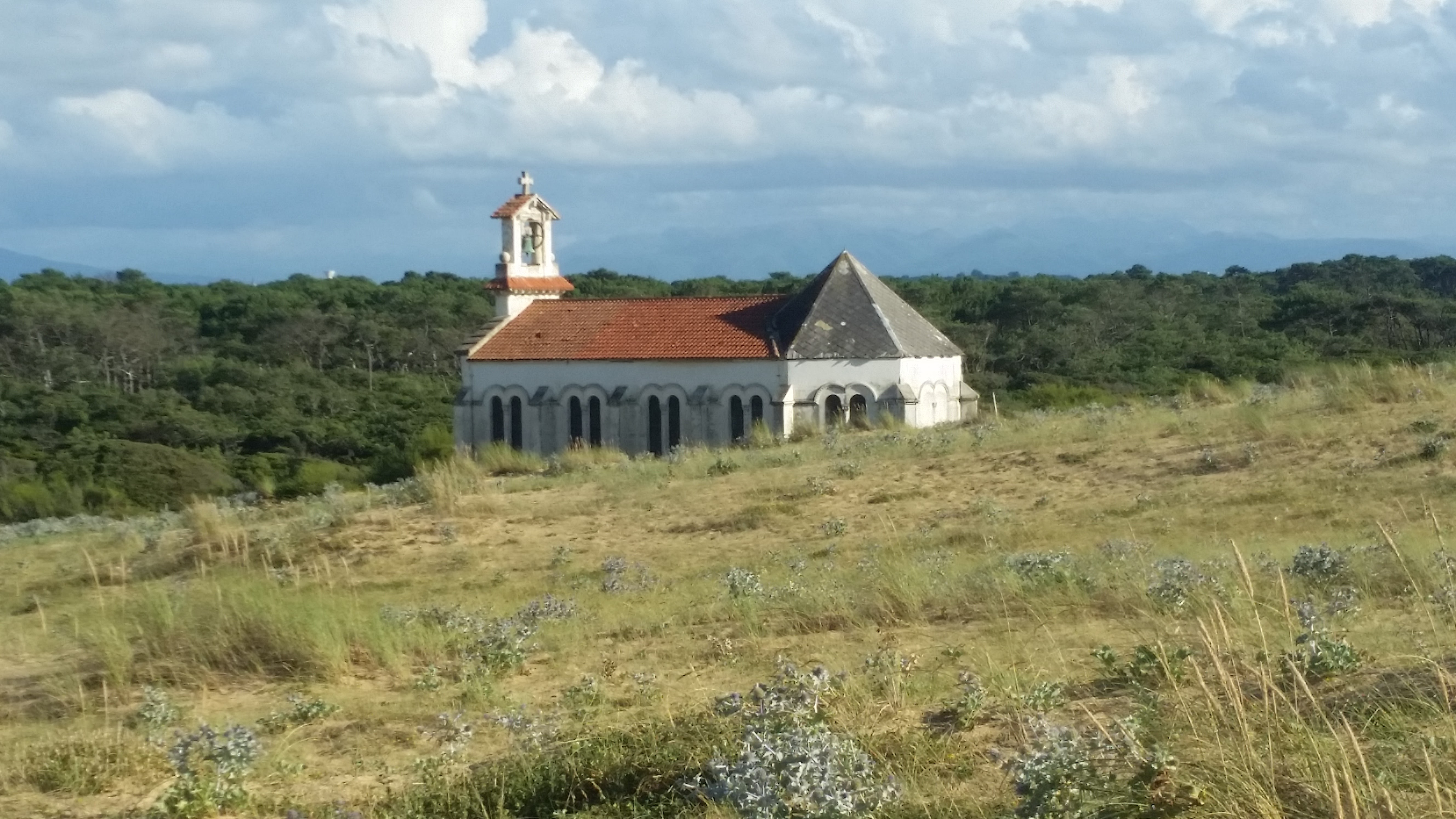 Chapelle perdue dans les dunes de Labelle-Océan (40)